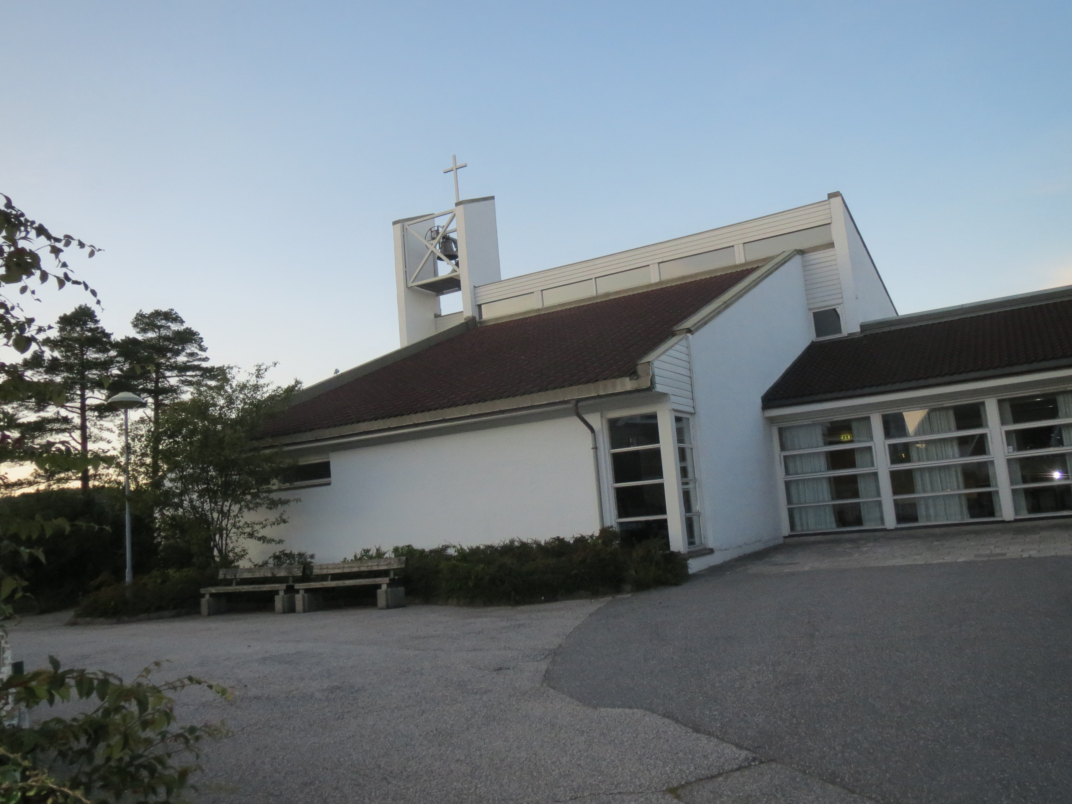 Hellemyr kirke i Kristiansand